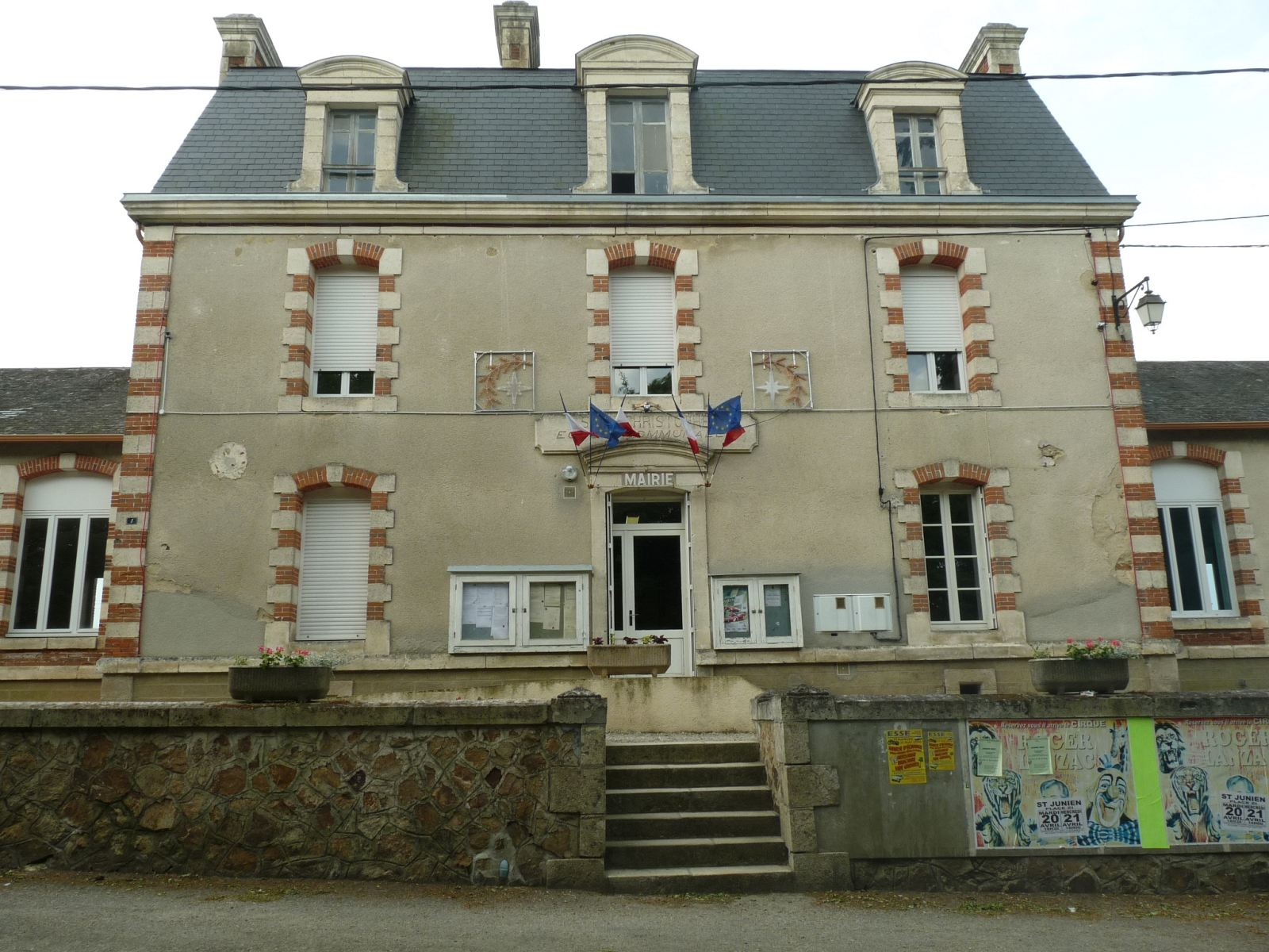 mairie de St-Christophe, Charente Limousine, France